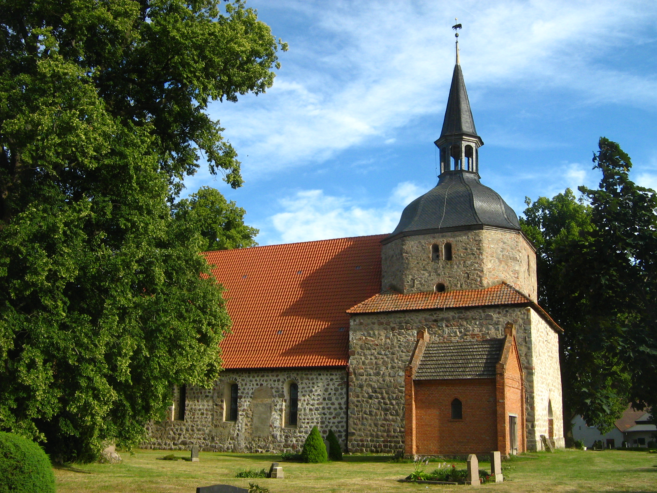 Die Kirche in Behren-Lübchin (Landkreis Güstrow, Mecklenburg-Vorpommern). Feldsteinbau mit eingezogenem Chor und halbrunder, außen dreiseitiger Apsis aus dem 13. Jh. Der quadratische Turm wurde etwas später vorgesetzt. Er ist breiter als das Schiff. Sein achteckiger Aufsatz mit geschweifter Haube und Laterne ist barock. (Quelle: Die Bau- und Kunstdenkmale in der DDR, Teil Bezirk Neubrandenburg - Henschelverlag Kunst und Gesellschaft - 1982)